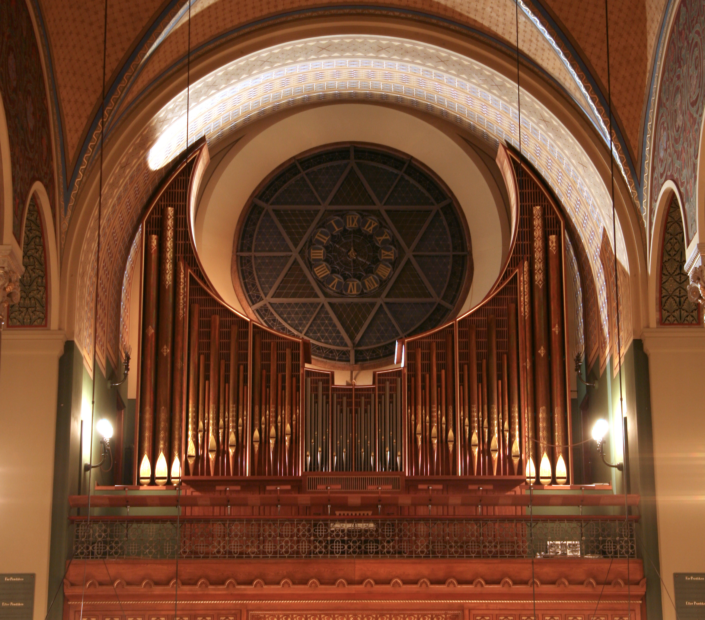 Jesuskirken, Valby, Copenhagen, Denmark Main organ.